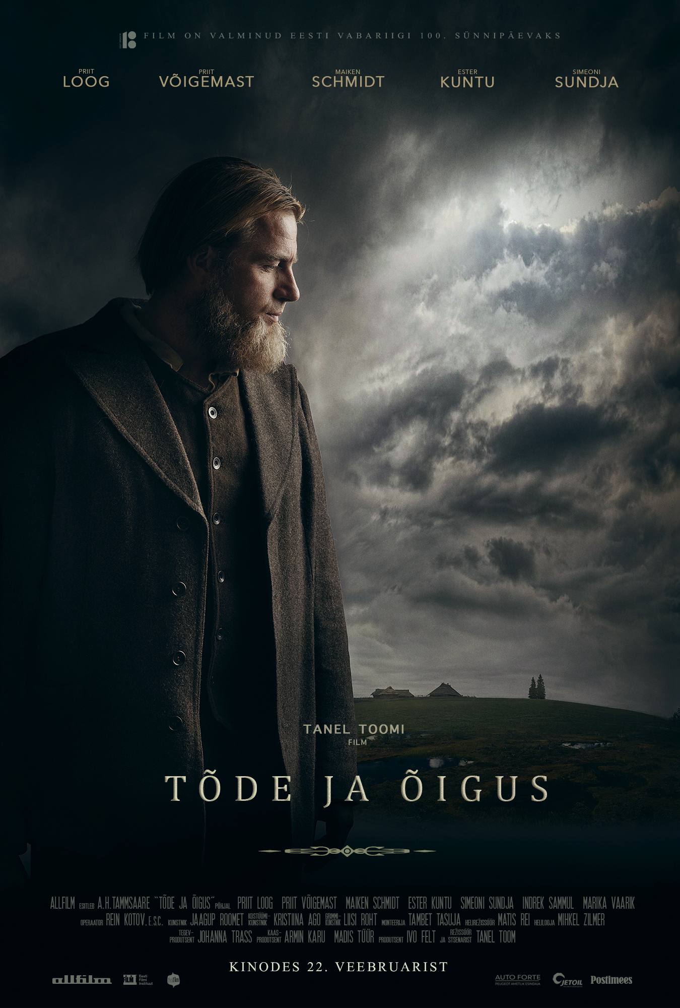 Filmi "Tõde ja õigus" poster